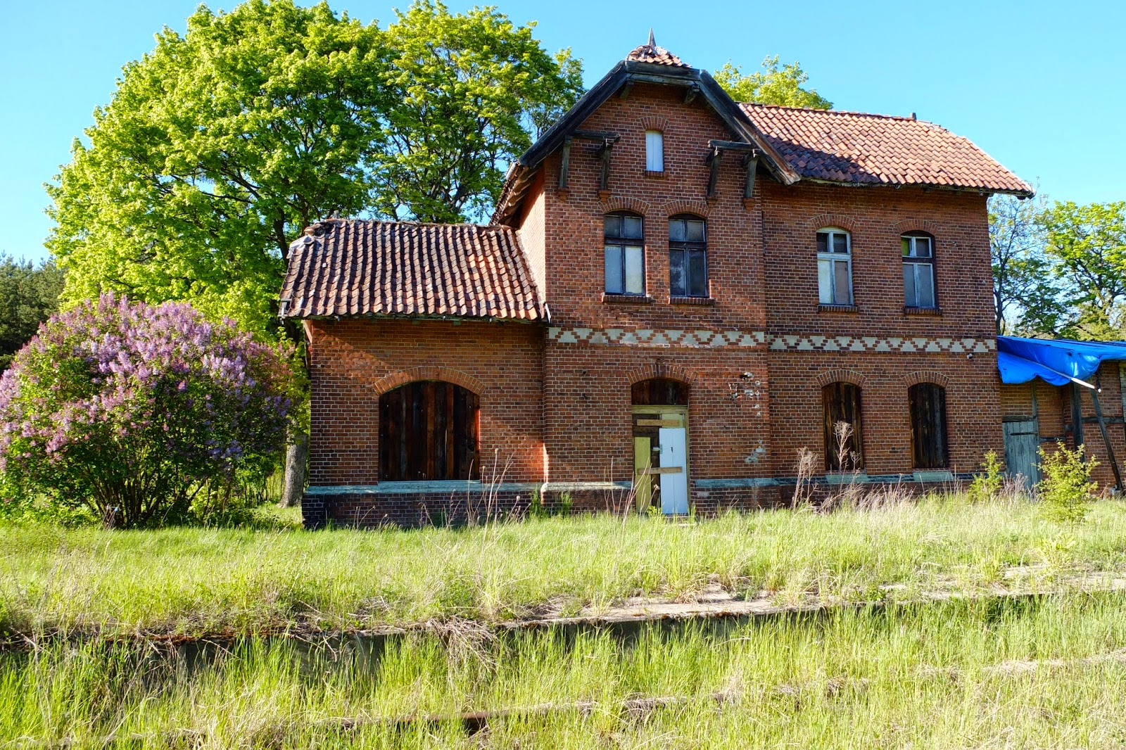 Kobułty - dworzec kolejowy